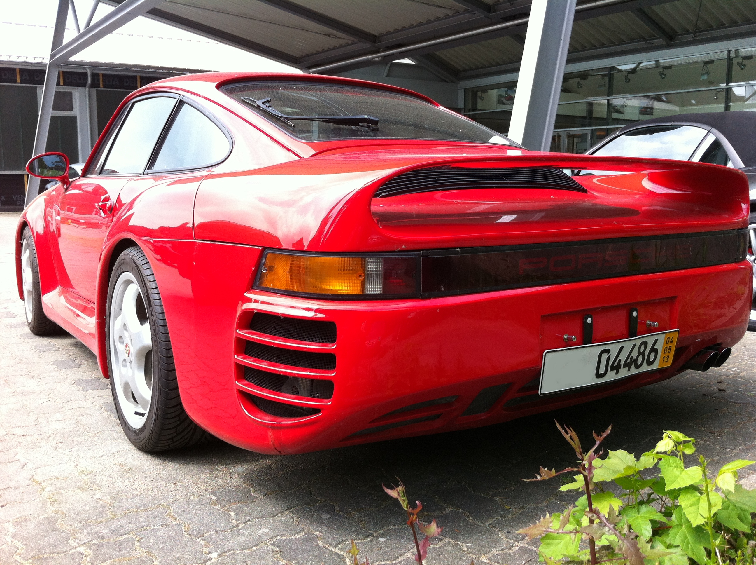 Porsche 964 Umbau 959